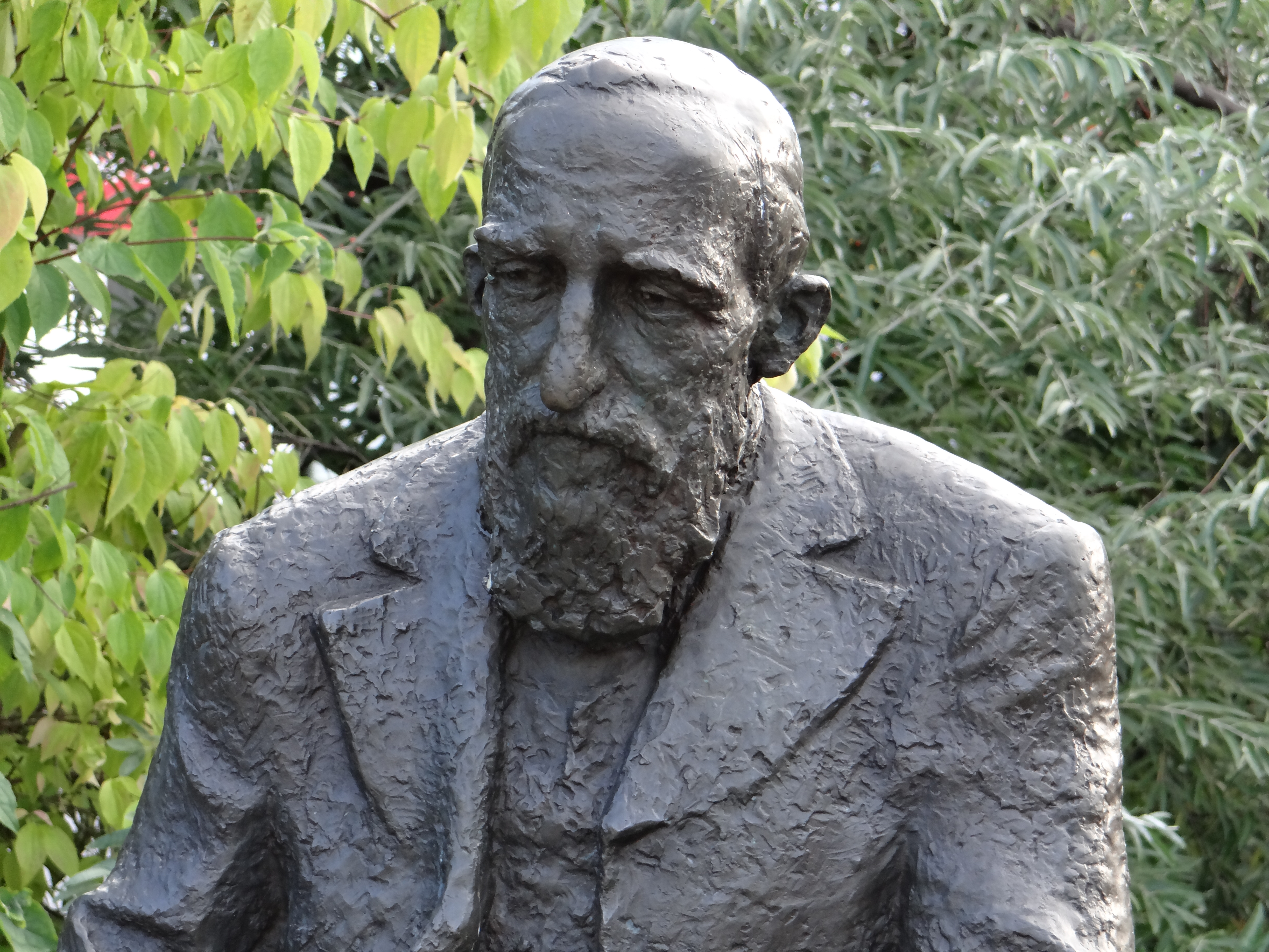 Ławeczka Józefa Ignacego Kraszewskiego w Białej Podlaskiej